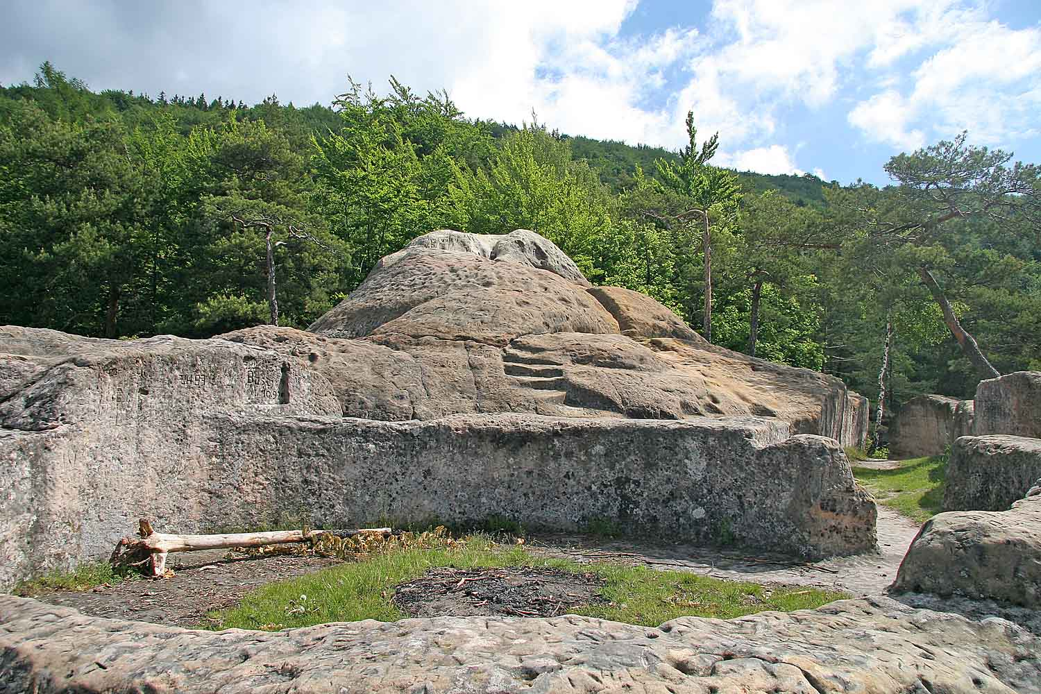 PP Vranovské skály u Mimoně, Juliina vyhlídka - pozůstatky vyhlídkového altánu z roku 1822 autor:Zp